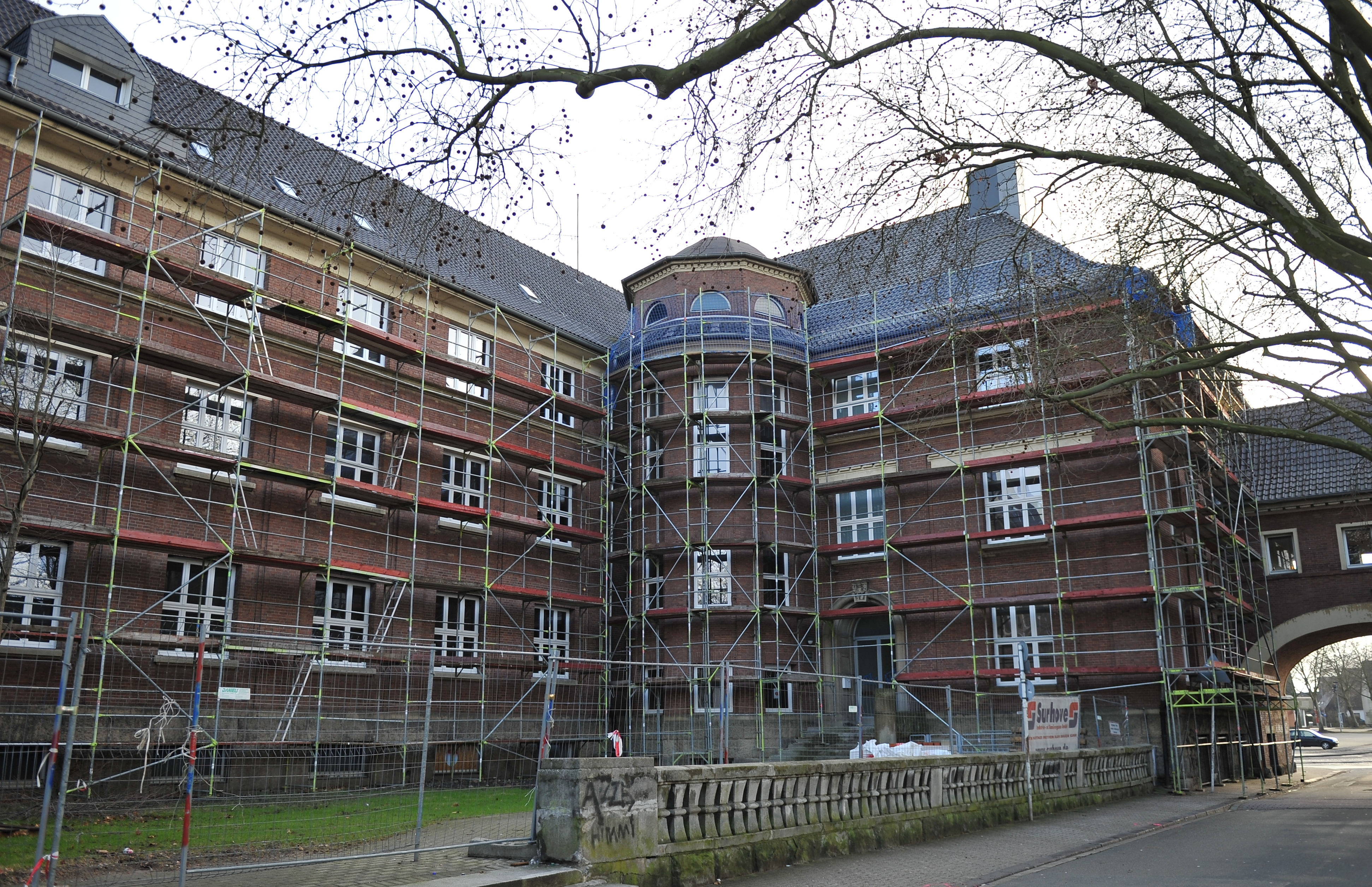 Baudenkmal Schule, Mengede Markt (während Renovierungsarbeiten 2012) im Stadtbezirk Dortmund-Mengede